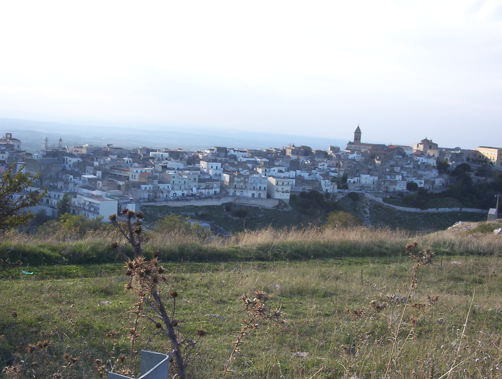 Foto realizzata da me